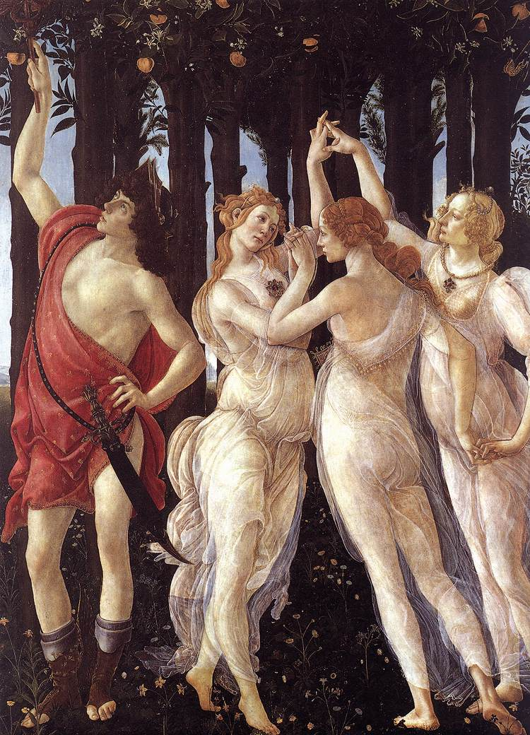 BOTTICELLI, Sandro Primavera Tempera on panel, 203 x 314 cm Galleria degli Uffizi, Florence